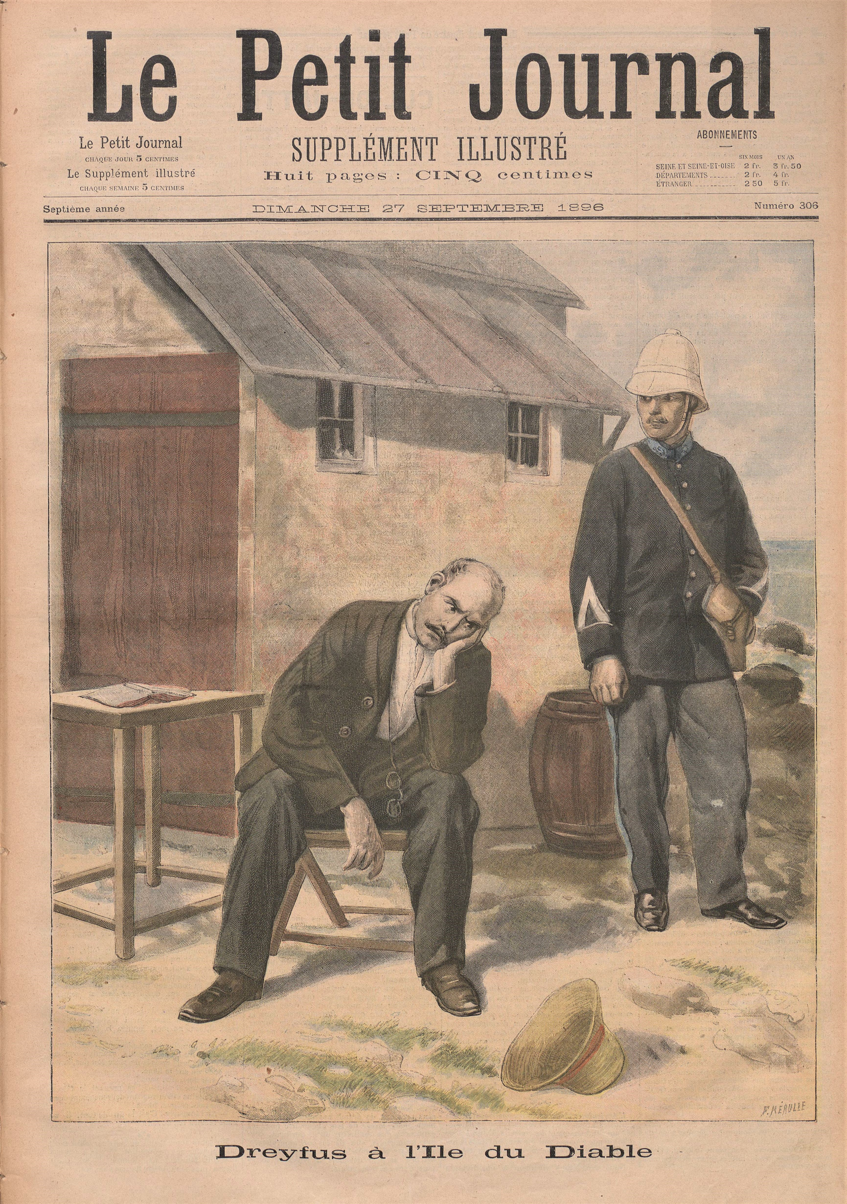 Image du Petit Journal - Affaire Dreyfus